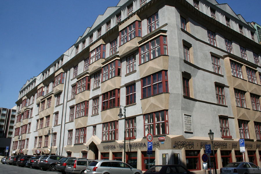 Učitelské domy v ulici Elišky Krásnohorské 10 a Bílkově ulici 5 v Praze-Josefově, architekt Otakar Novotný, stavitel firma arch. Františka Troníčka